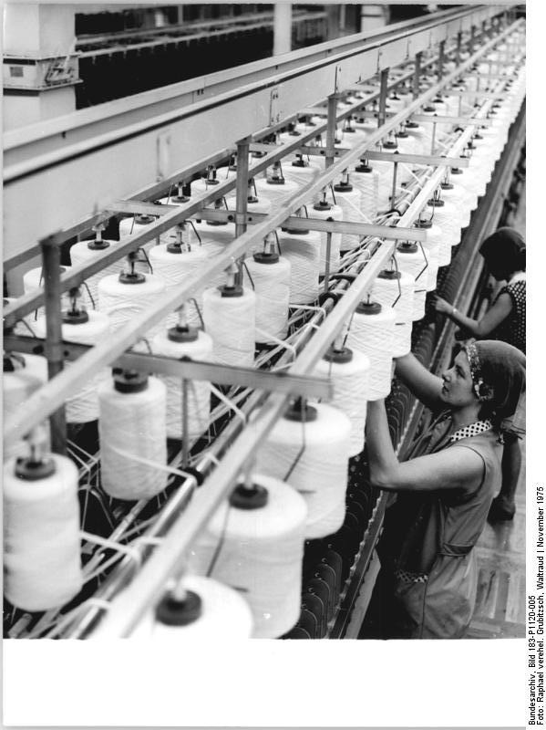 ADN-ZB-Raphael-20.11.75-Leipzig: Planerfüllung, Qualitätsarbeit und 3-Schicht-System werden von den Werktätigen des VEB Buntgarnwerke Leipzig, Betriebsteil Markkleeberg, groß geschrieben. Durch die ständige Qualifizierung der Kolleginnen wurde eine 100 (100) prozentige Auslastung aller Maschinen erreicht. Im rekonstruierten Werk können die rund 200 Textilfacharbeiterinnen mit den neuen Anlagen im Jahr für 100000(100000) Anzüge mehr herstellen. Zu den Spinnerinnen, die für vorbildliche Qualität bekannt sind, gehört auch die Bezirkstagsabgeordnete Bärbel Diehl (vorn), die bereits dreimal als Aktivist ausgezeichnet wurde.